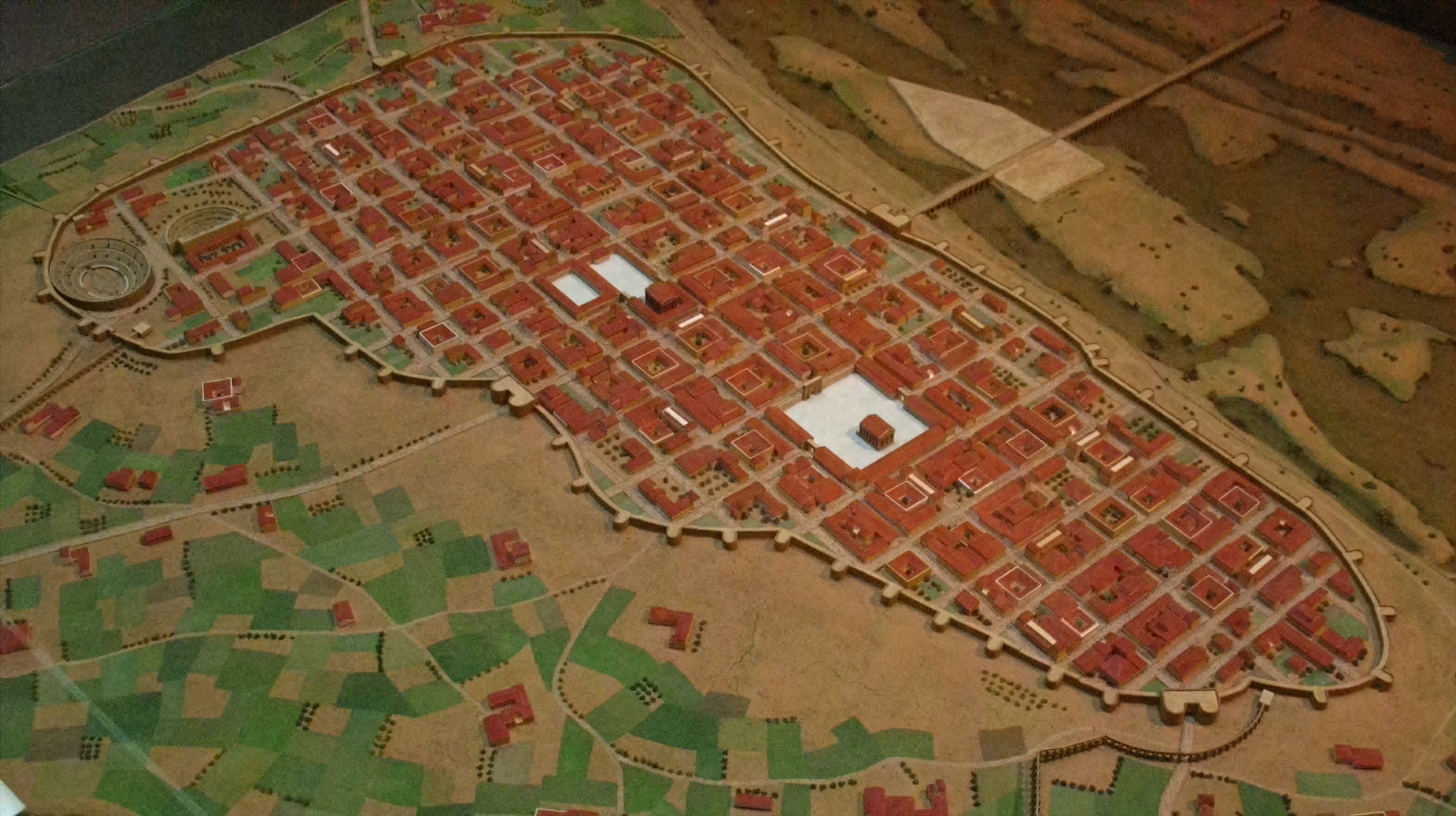 Maqueta de como debió ser la ciudad de Emerita Augusta, tal y como se puede ver el en Muséo Nacional de Arte Romano de la ciudad de Mérida (España)